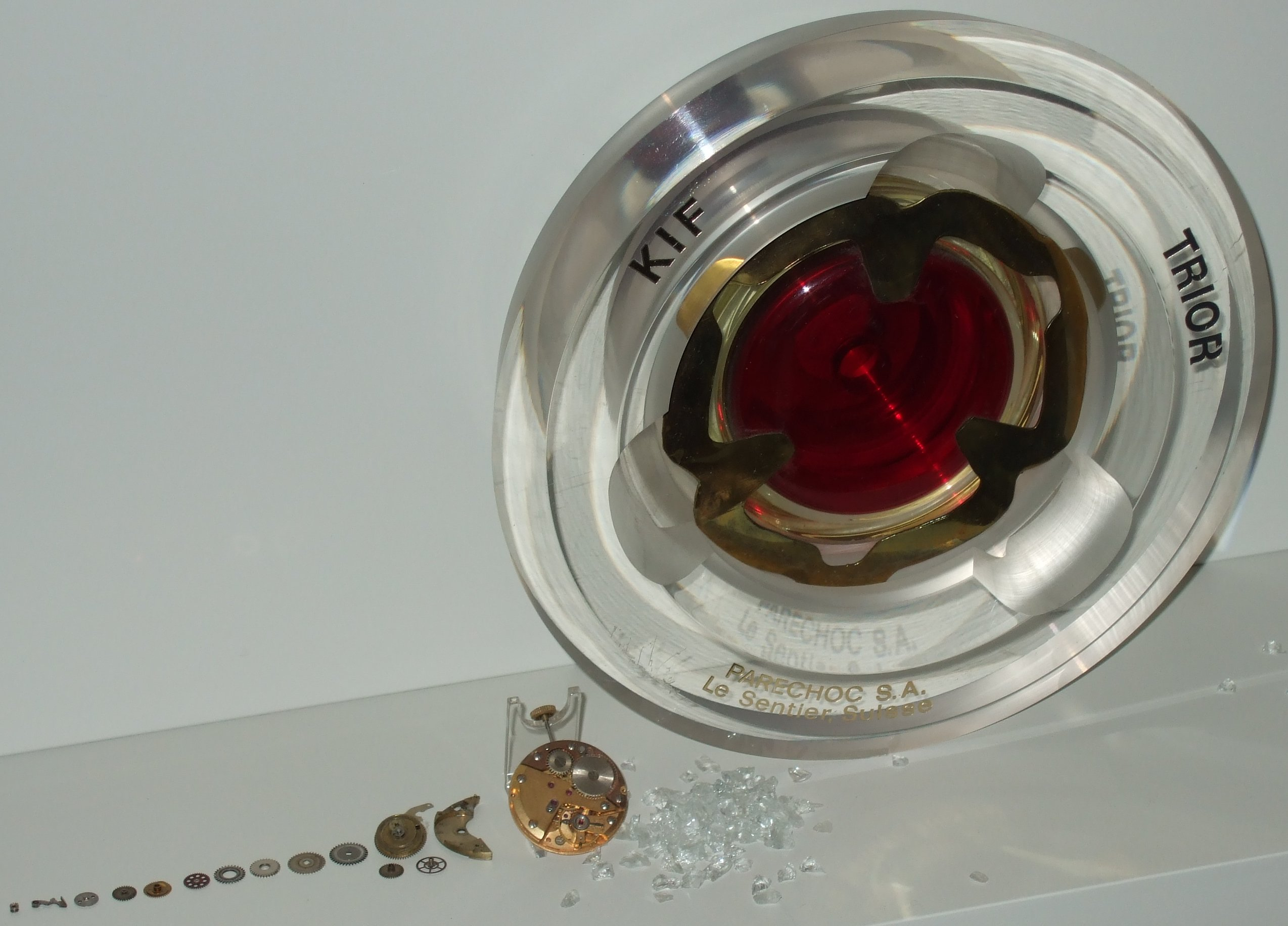 Stoßsicherung der Firma Parechoc. (Ausstellungsstück der Uhrensammlung Karl Gebhardt in Nürnberg )